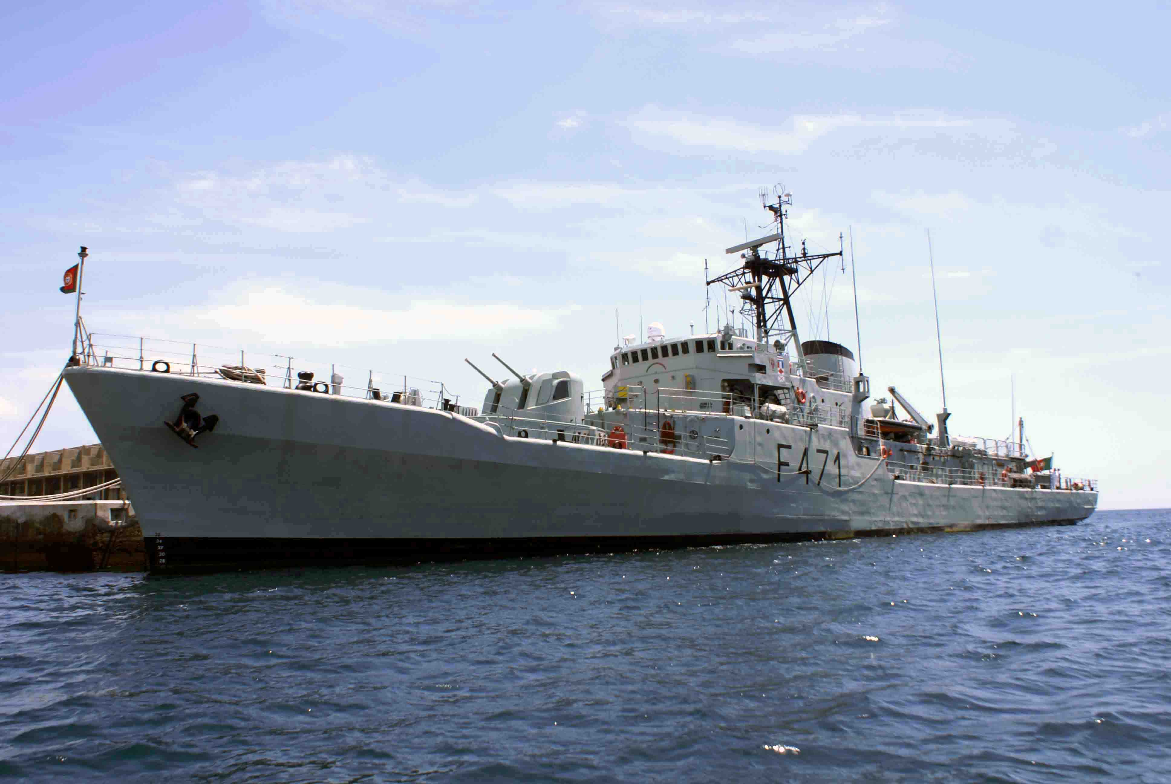 Corveta da Marinha Portuguesa NRP António Enes no Porto de Pipas, Angra do Heroísmo, ilha Terceira, Açores, Portugal.